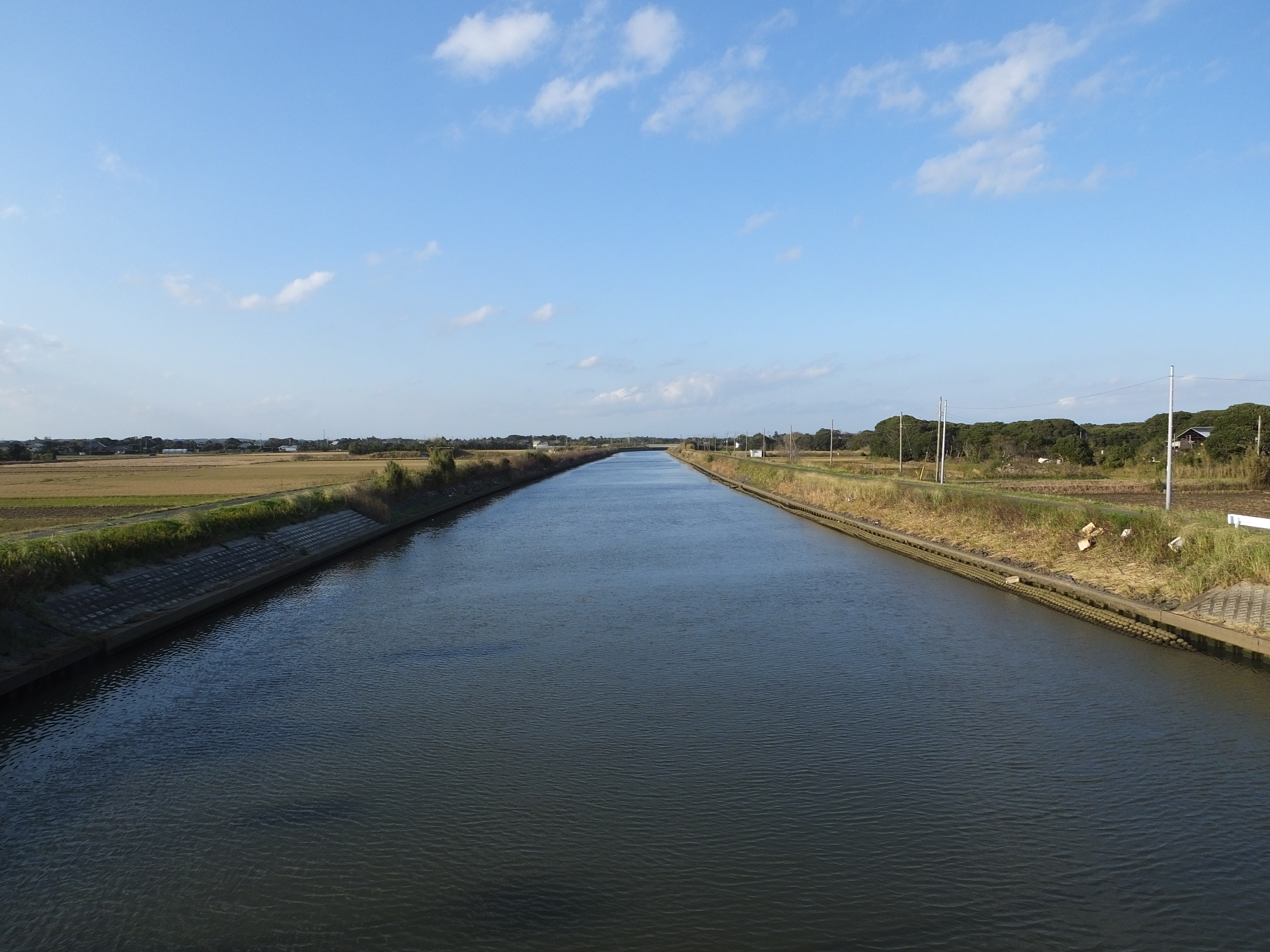 新川（新浜大橋より上流方、千葉県匝瑳市）